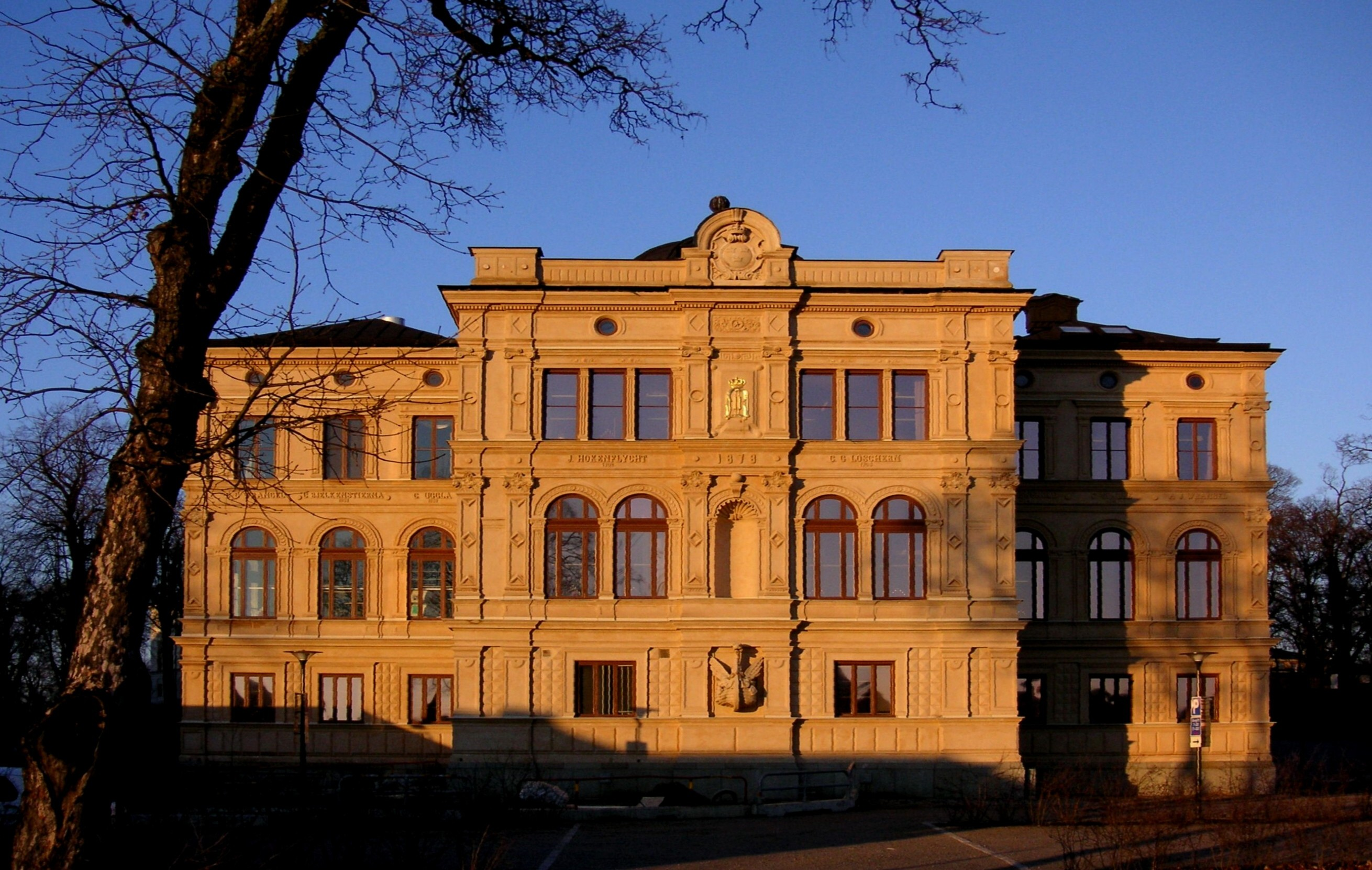 Gamla Sjökrigsskolans byggnad på Skeppsholmen i Stockholm